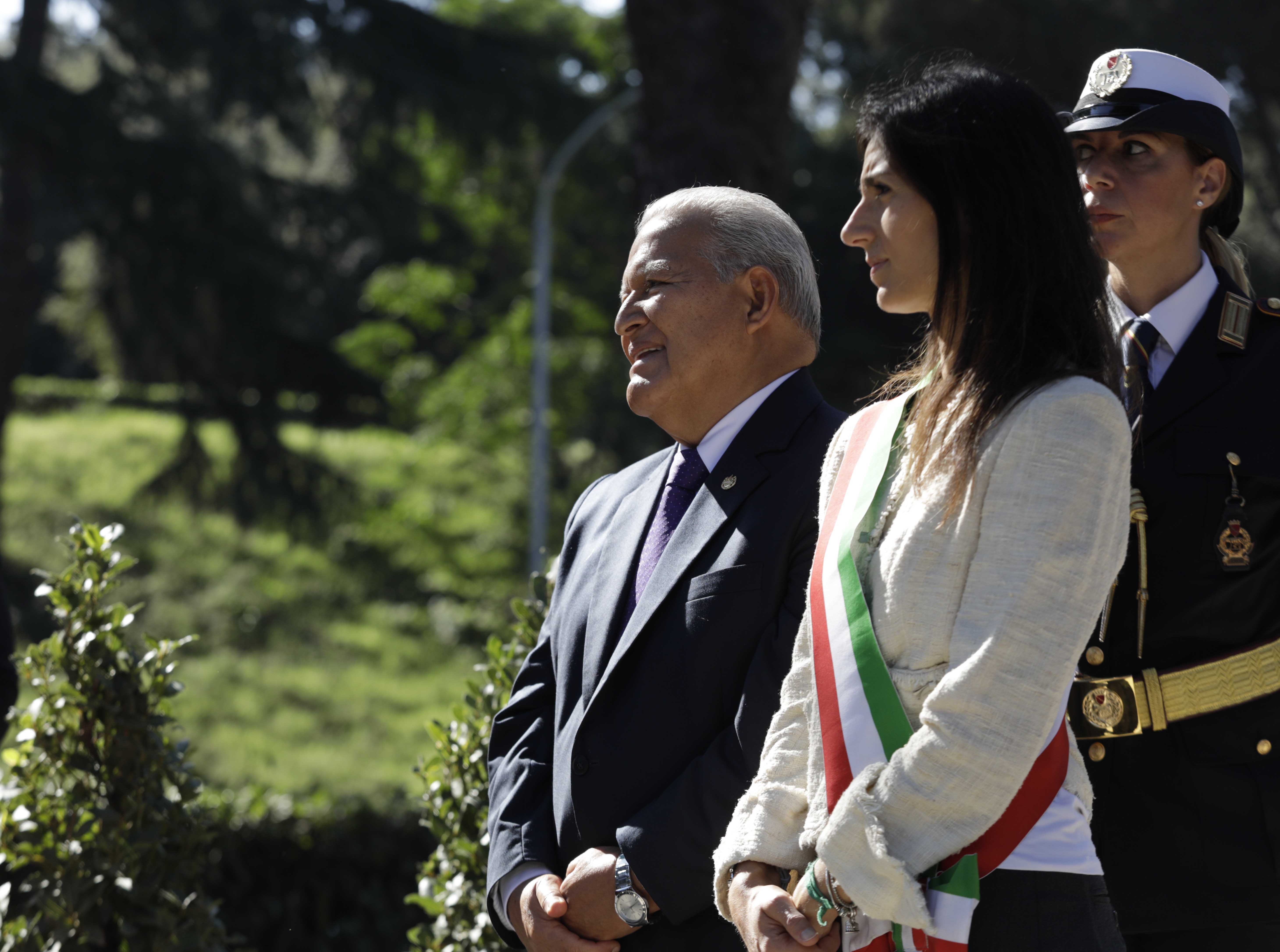 Develación de escultura de Monseñor Romero.